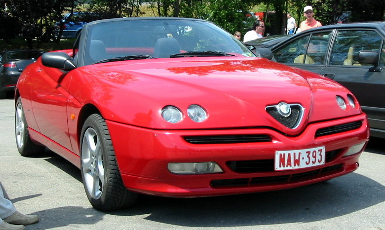 Alfa Romeo GTV Spider